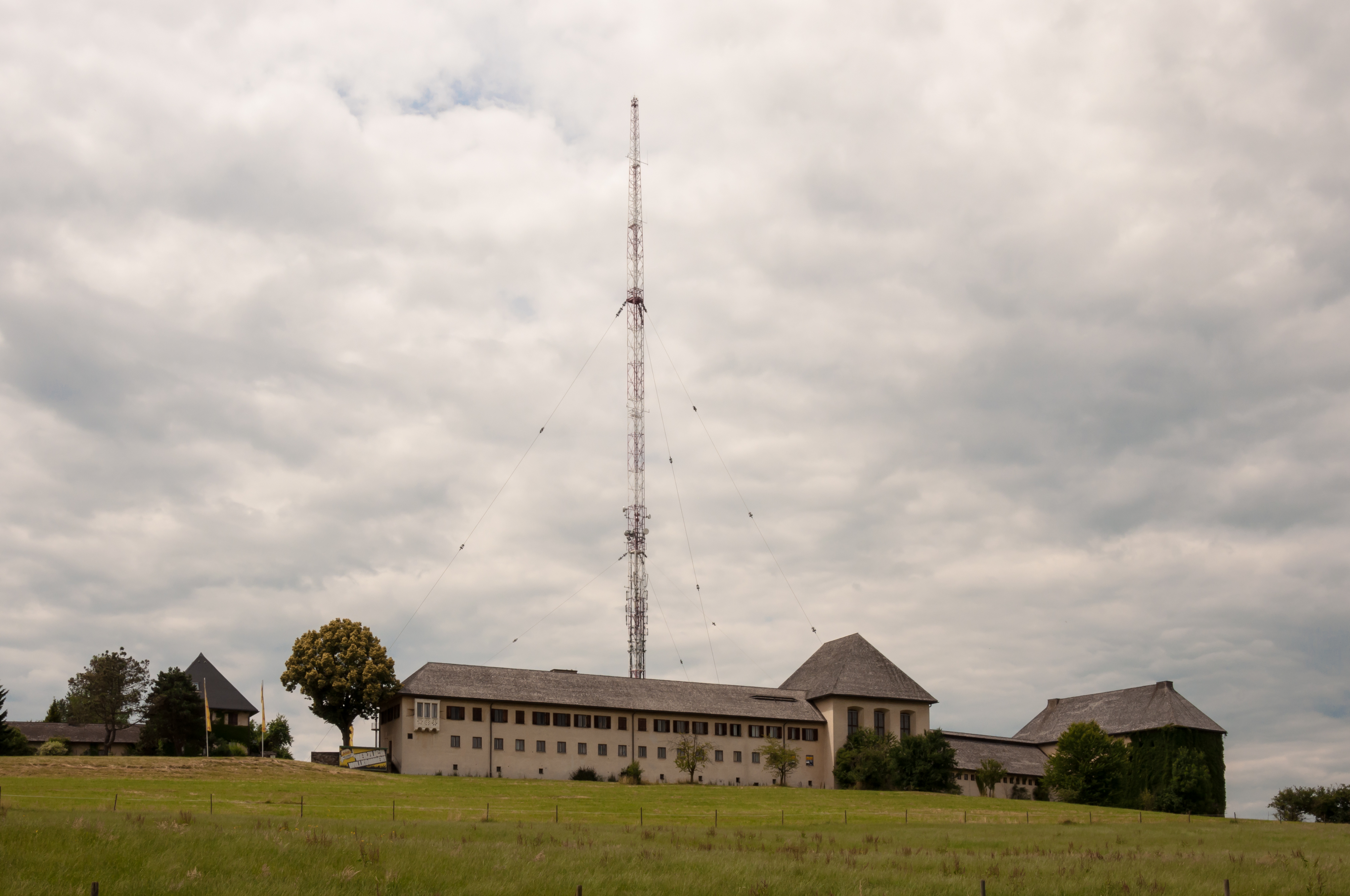 Sendeanlage Dobl (ehem. Sender Alpen)